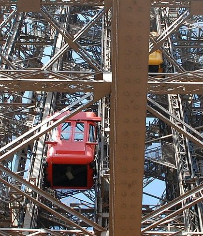 Torre Eiffel. Elevador entre los niveles 2 y 3.